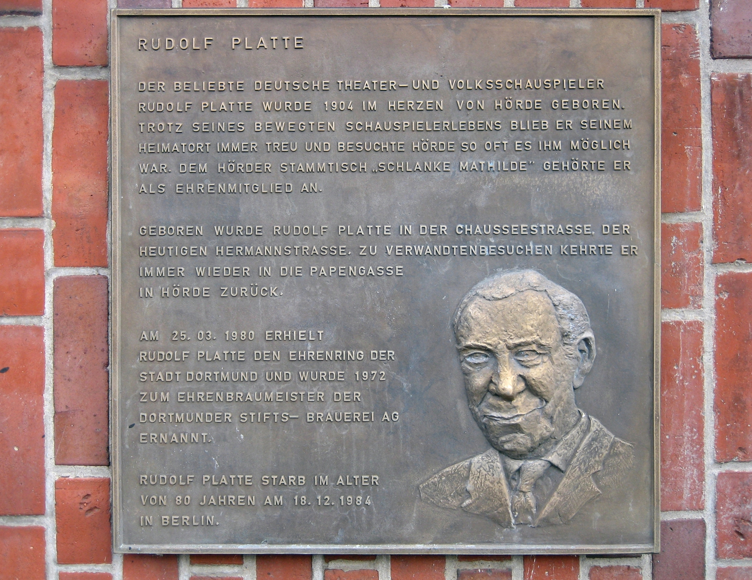 Gedenktafel für Rudolf Platte an der ehemaligen Dortmund-Hörder Stiftsbrauerei